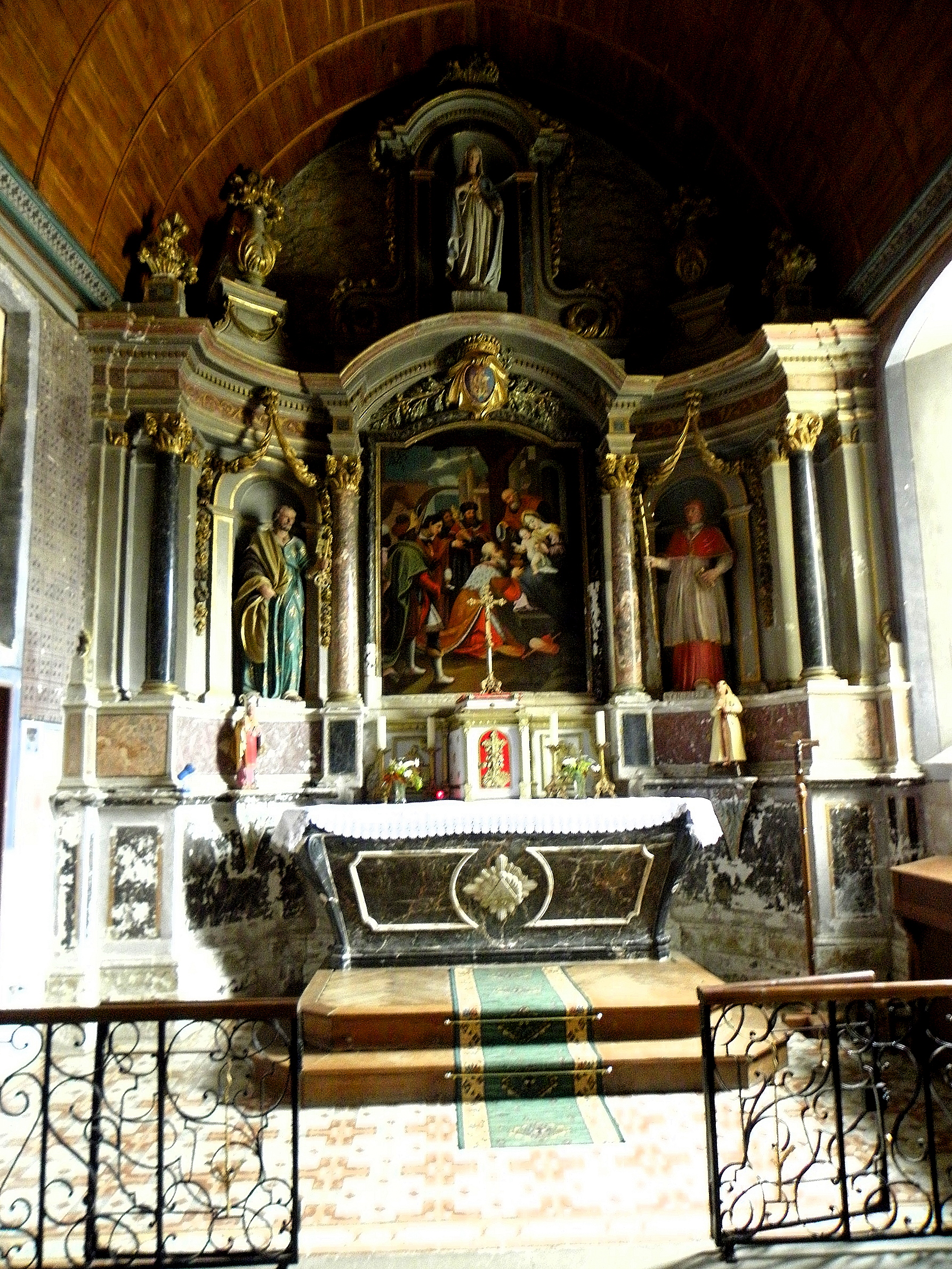 Église Saint-Pierre de Bouchamps-lès-Craon (53). Maître-autel et son retable.